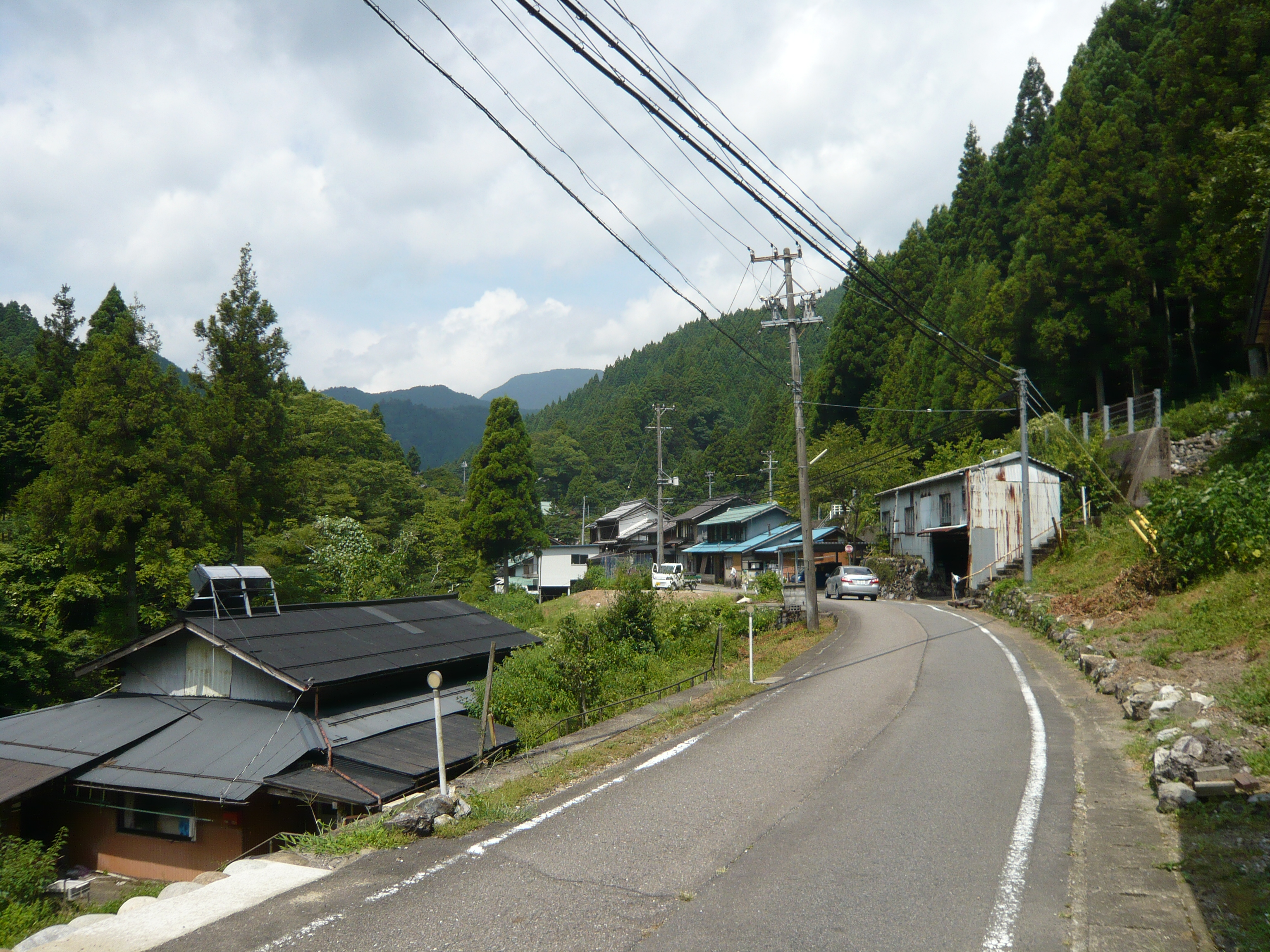 山県市美山町神崎